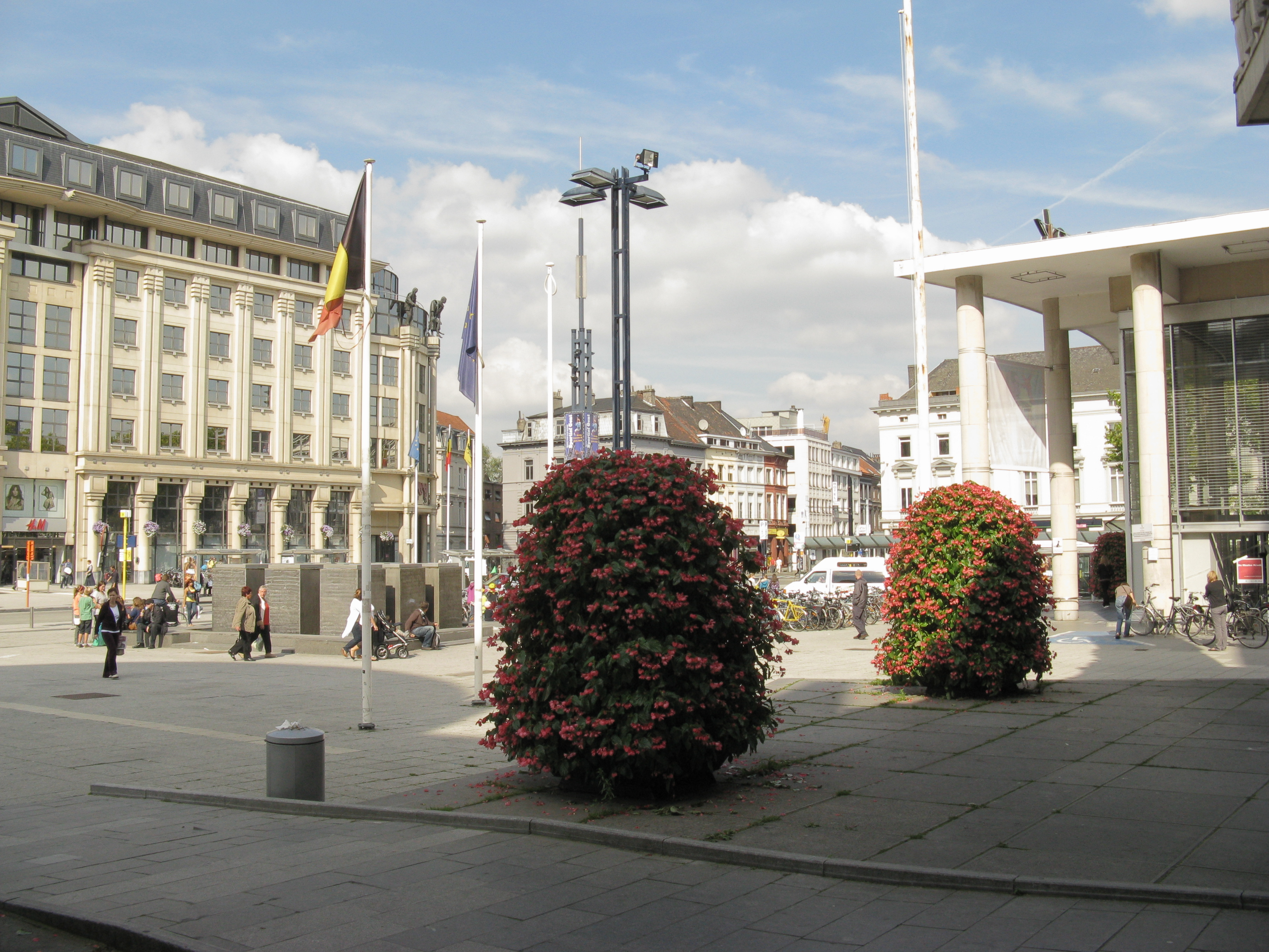 Het Woodrow Wilsonplein ("Zuid" in de volksmond) in Gent.